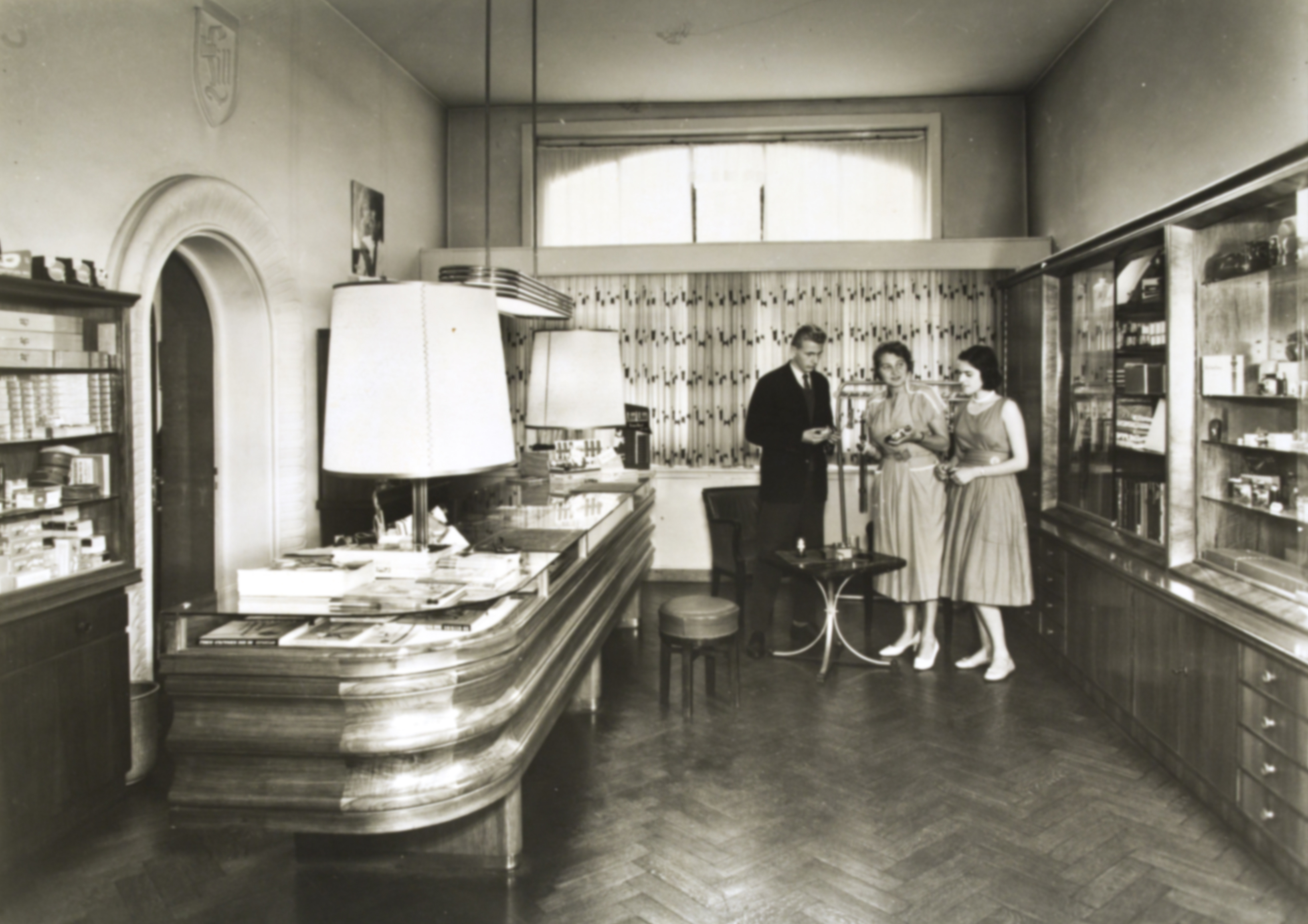 Die Möblierung und Einrichtung der 1950er Jahre im Studio Photo Lill in der Oskar-Winter-Straße 9 am Lister Platz in Hannover ...